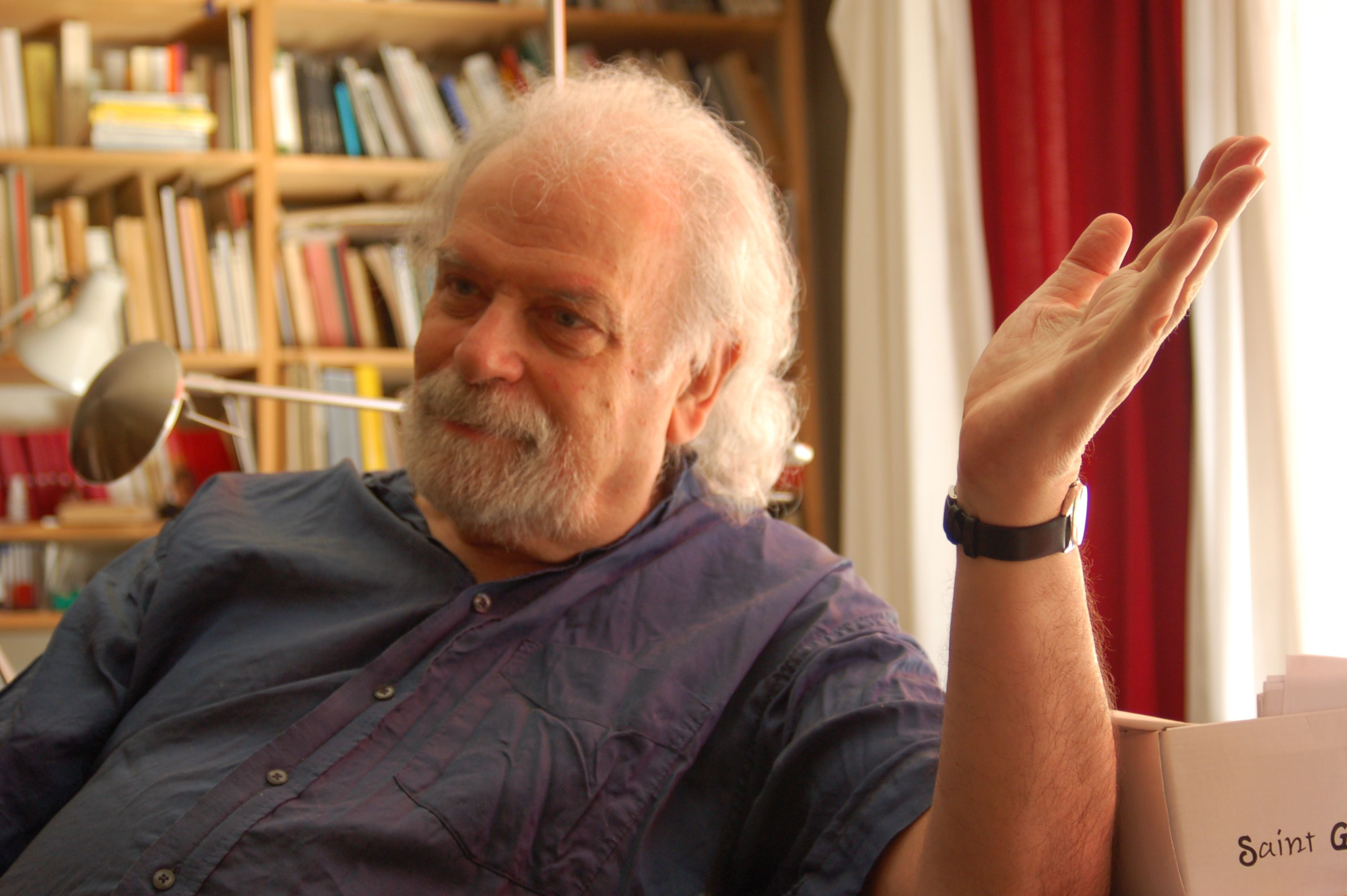 Portrait des Komponisten